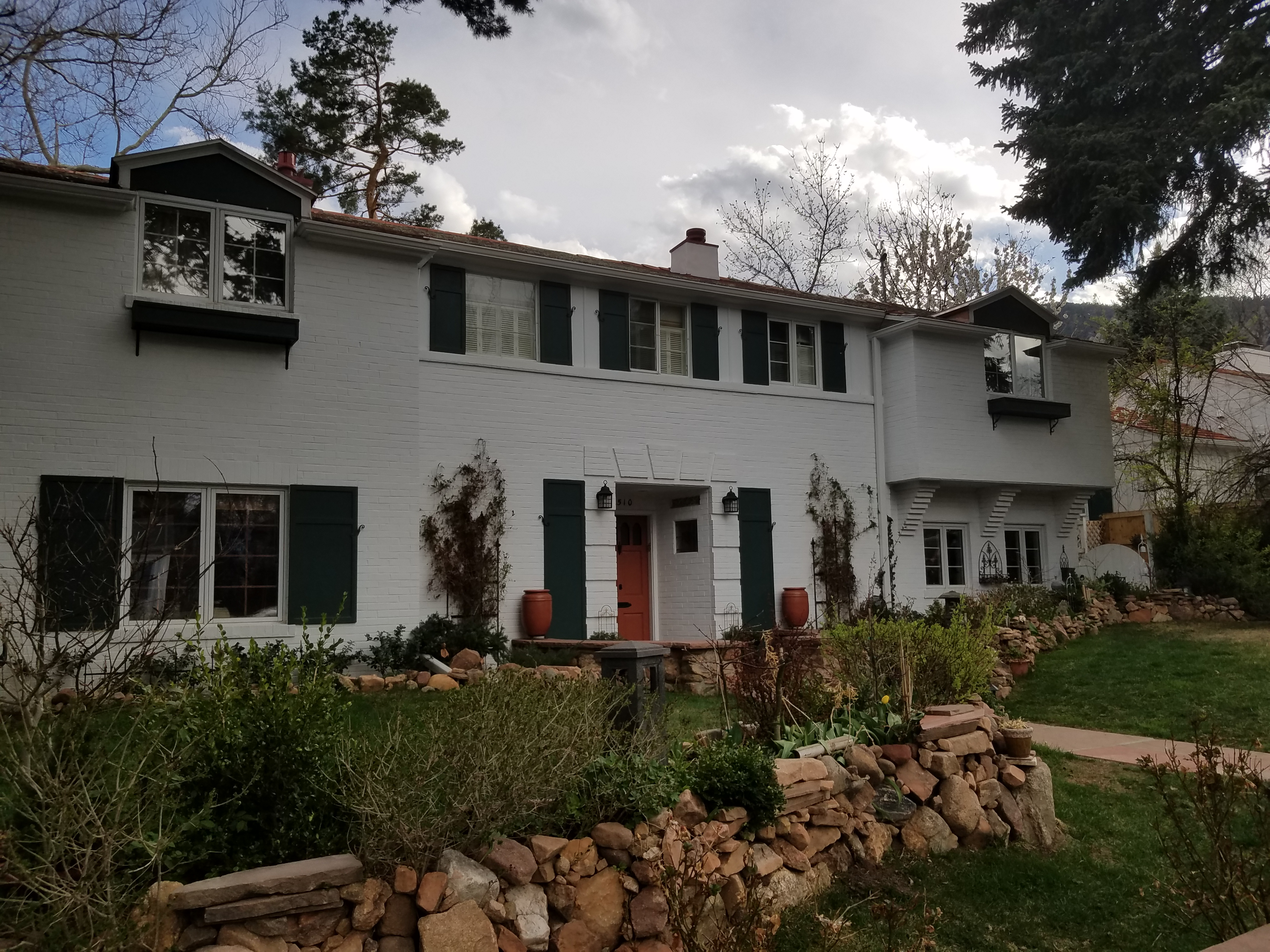 Allen House